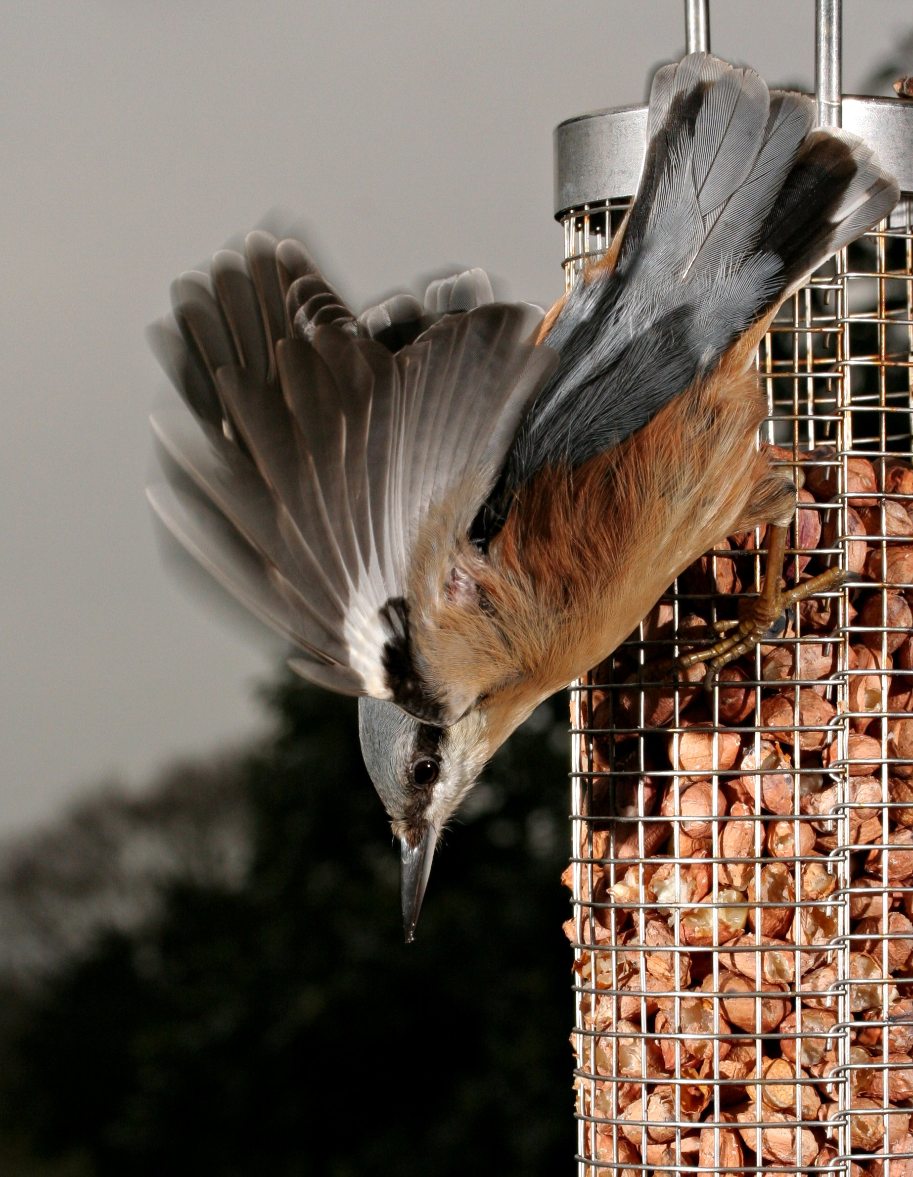 Photo credit: Cerys Ross EvansWe inadvertantly took part in National Bird Day (UK) yesterday morning and captured some great shots of bird table visitors from the comfort of the sitting room. I set up the camera and flashes and Cerys pressed the remote trigger. Canon EOS350D, Canon EFS 60mm macro. f/13.0, 1/250th second, ISO400. Camera on a tripod half a meter (20 inches) from the nut feeder being remote fired from the sofa using a pair of Pocket Wizard Plus II. Nikon SB28 camera right 1/16th, Nikon SB28 camera left 1/32 (slightly closer) both also fired with Pocket Wizard Plus II. Having the ambient light a few stops lower seems to add drama - it was quite a dark grey Winter day anyway. White balance : flash. Post: Cropped, adjusted levels slightly, unsharp mask applied (radius 40px, amount 0.17, threshold 0), bordered using Gimp/Linux. The birds didn't seem to mind the flashes at all (we had to fire them every now and them to stop them going into standby - even using the mode button technique) but the camera noise scared them, although after an hour some of them had gotten used to it. If we had the setup running for a day or so I think most of them would ignore it. Should maybe use custom white balance.